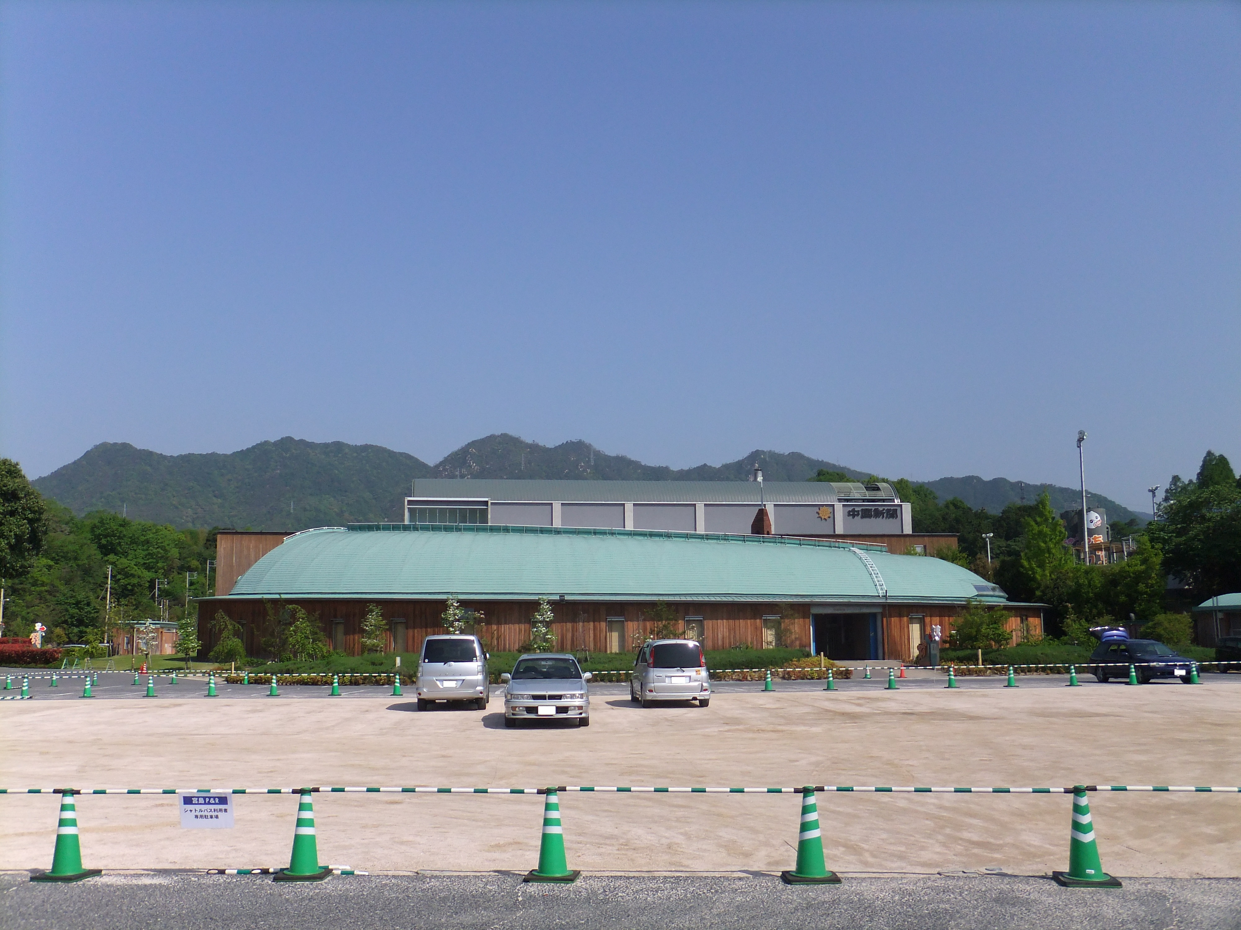 チューピーパーク